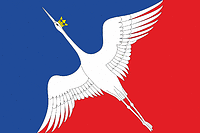 Флаг Лахденпохского района, Карелия